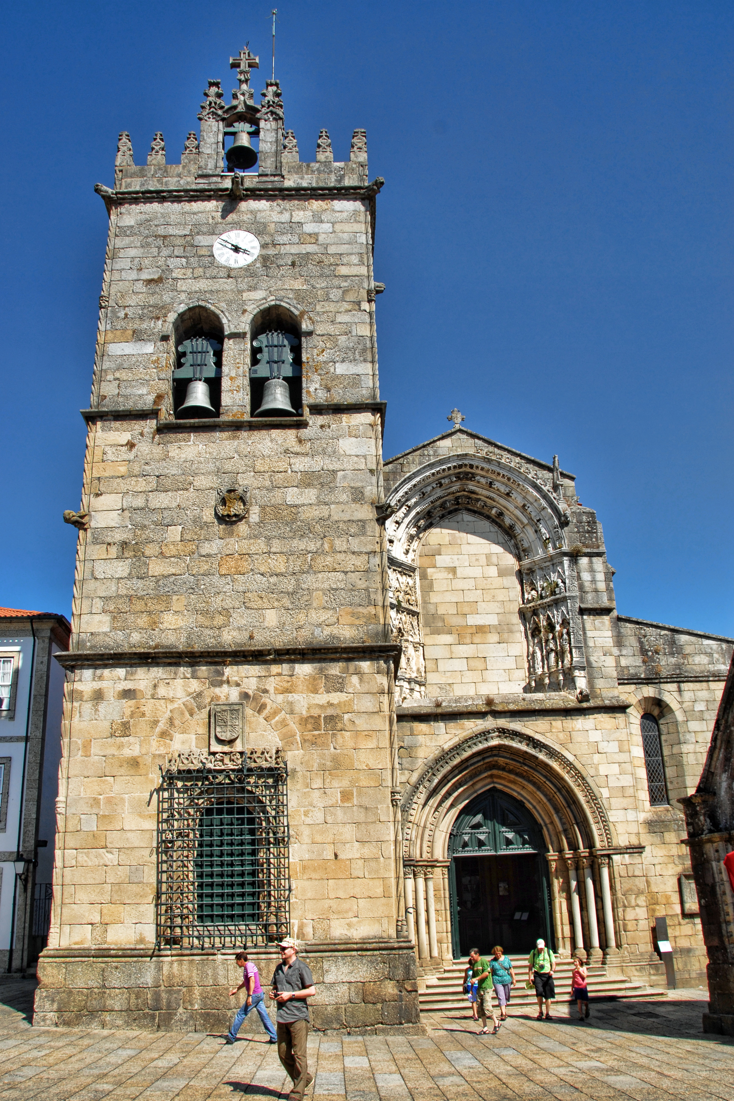 Guimarães - Igreja de Nossa Sra. da Oliveira ou Igreja da Colegiada de Guimarães This file was uploaded for Wiki Loves Monuments in Portugal with the unique identifier 70509.